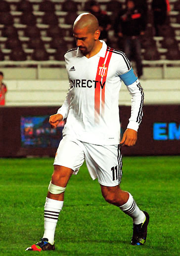 Juan Sebastián Verón, capitán de Estudiantes de La Plata, en el regreso al fútbol argentino en condición de local, partido en el que su equipo derrotó a All Boys (1-0) por la 2da. fecha del Torneo Inicial 2013.